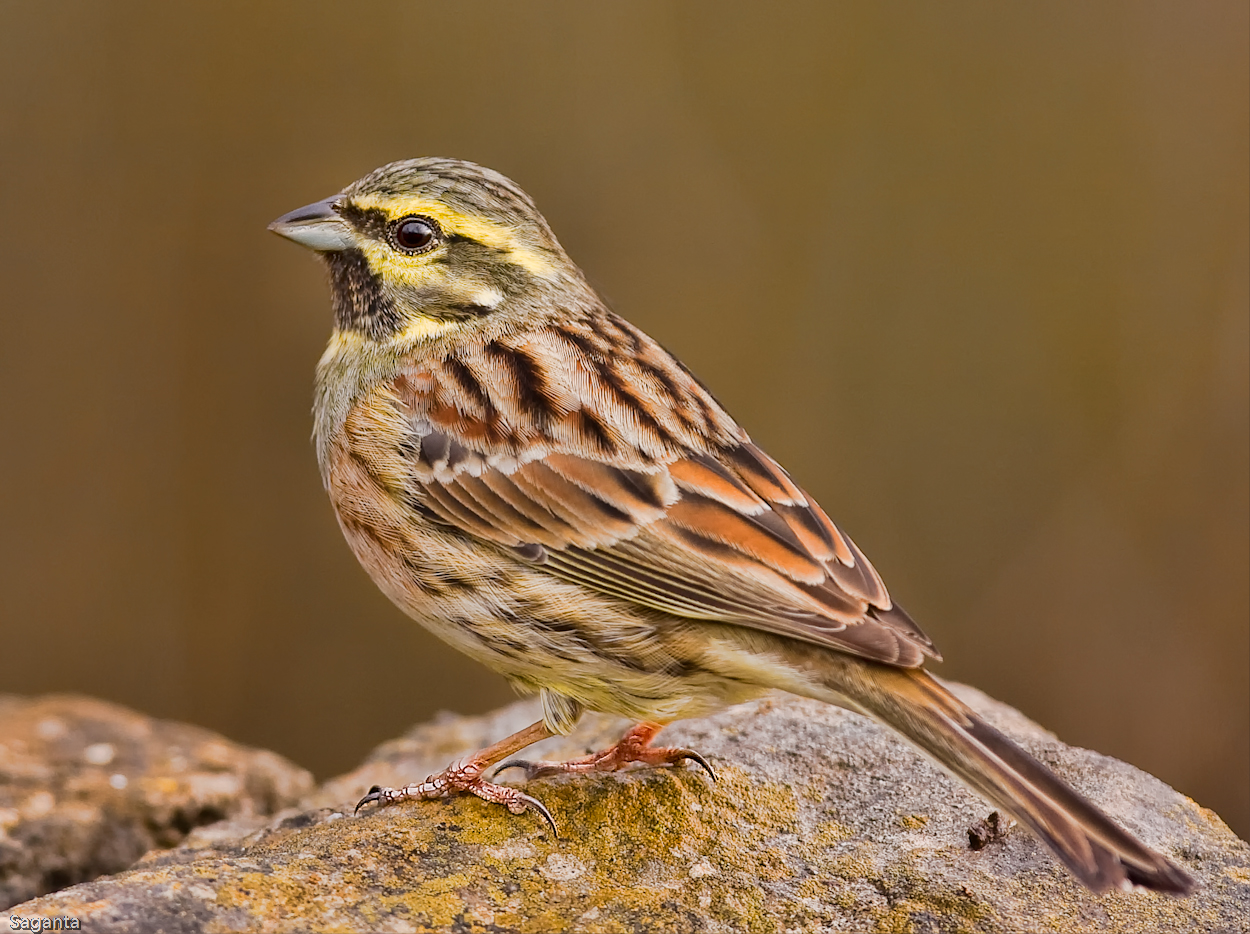 Male Cirl Bunting, Emberiza cirlus, Ayódar, Valencia, Spain